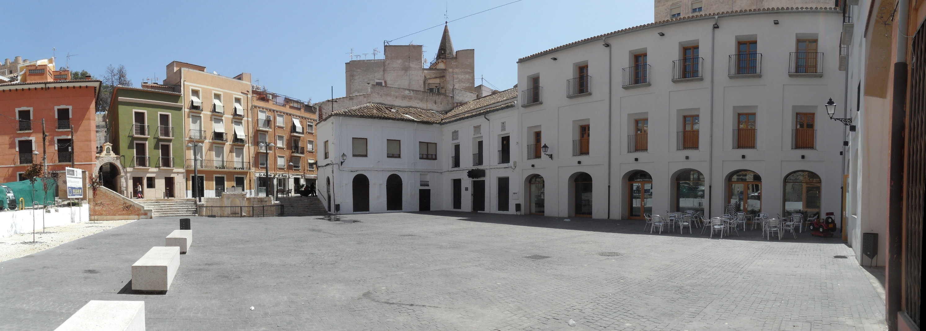 Panoràmica de la Plaça Major de Villena, reformada el 2011.